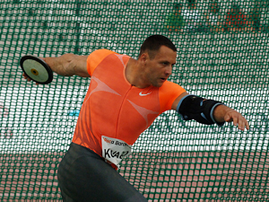 Zoltan Kovago al Meeting di Barcellona nel 2009